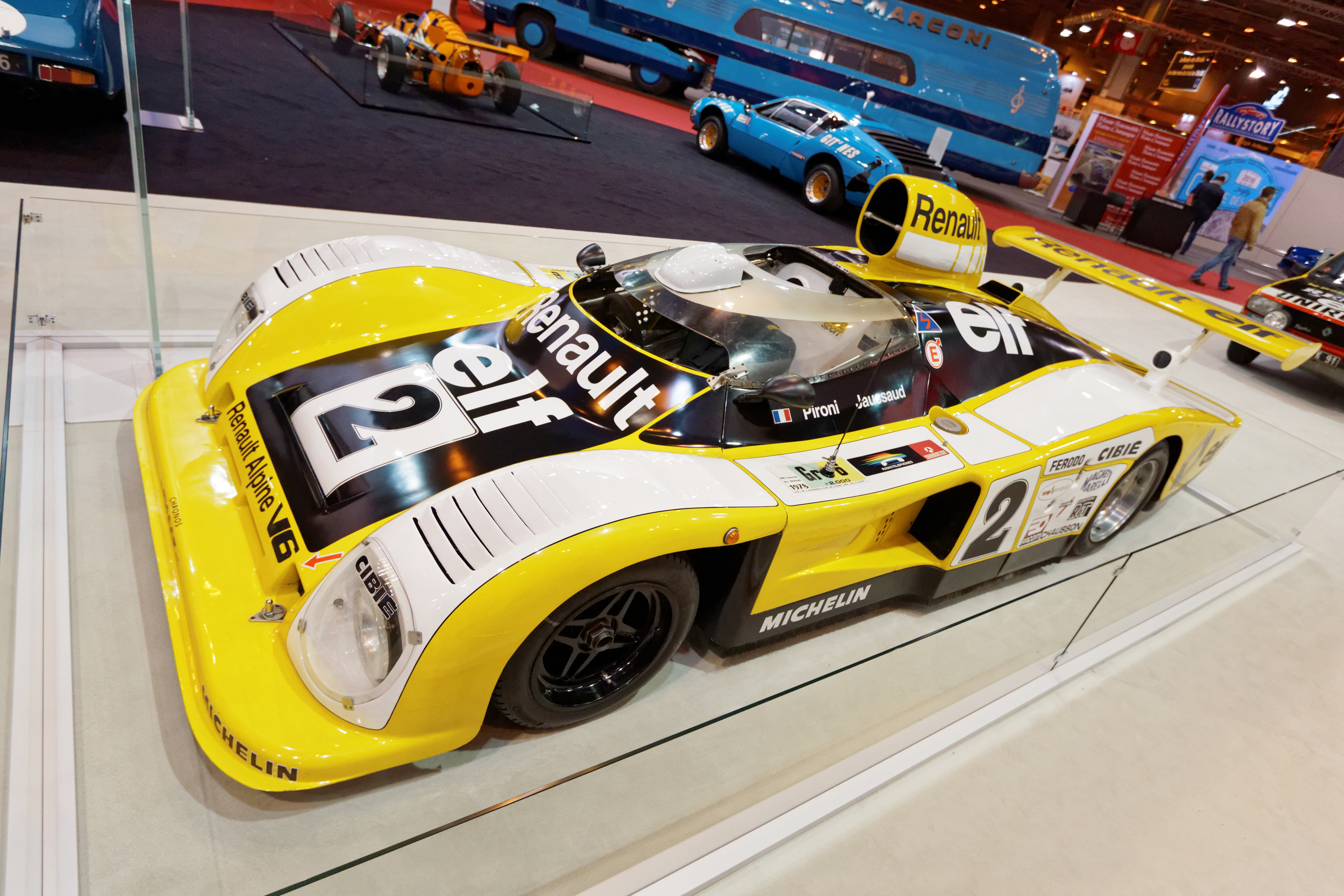 Une Renault Alpine A442 B de 1978 exposée lors du salon Rétromobile 2016.